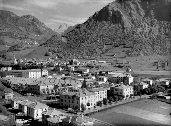 Vecchia fotografia della Manifattura e villaggio operaio Festi Rasini. Dietro il paese di Villa d'Ogna